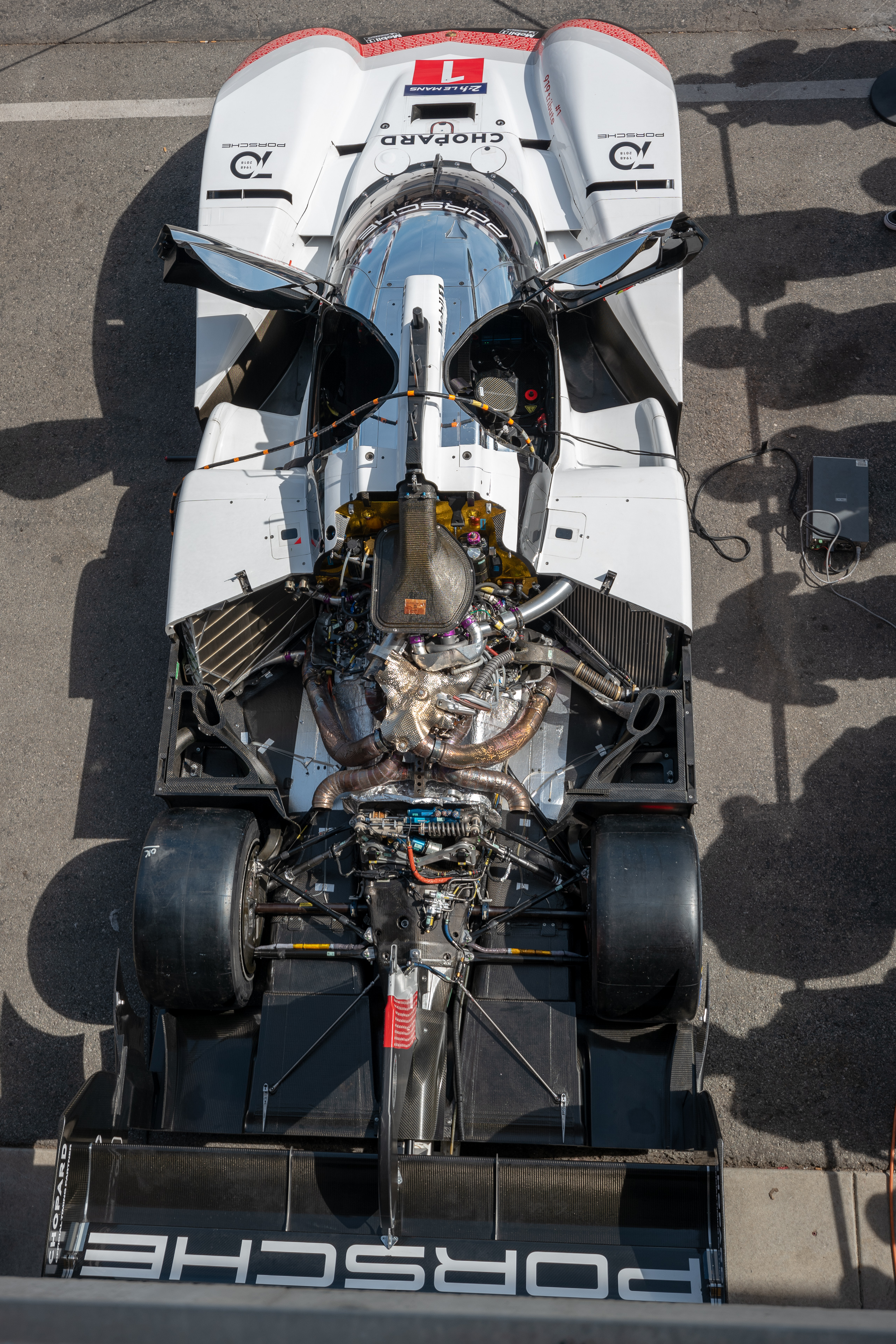 Rennsport Reunion VI